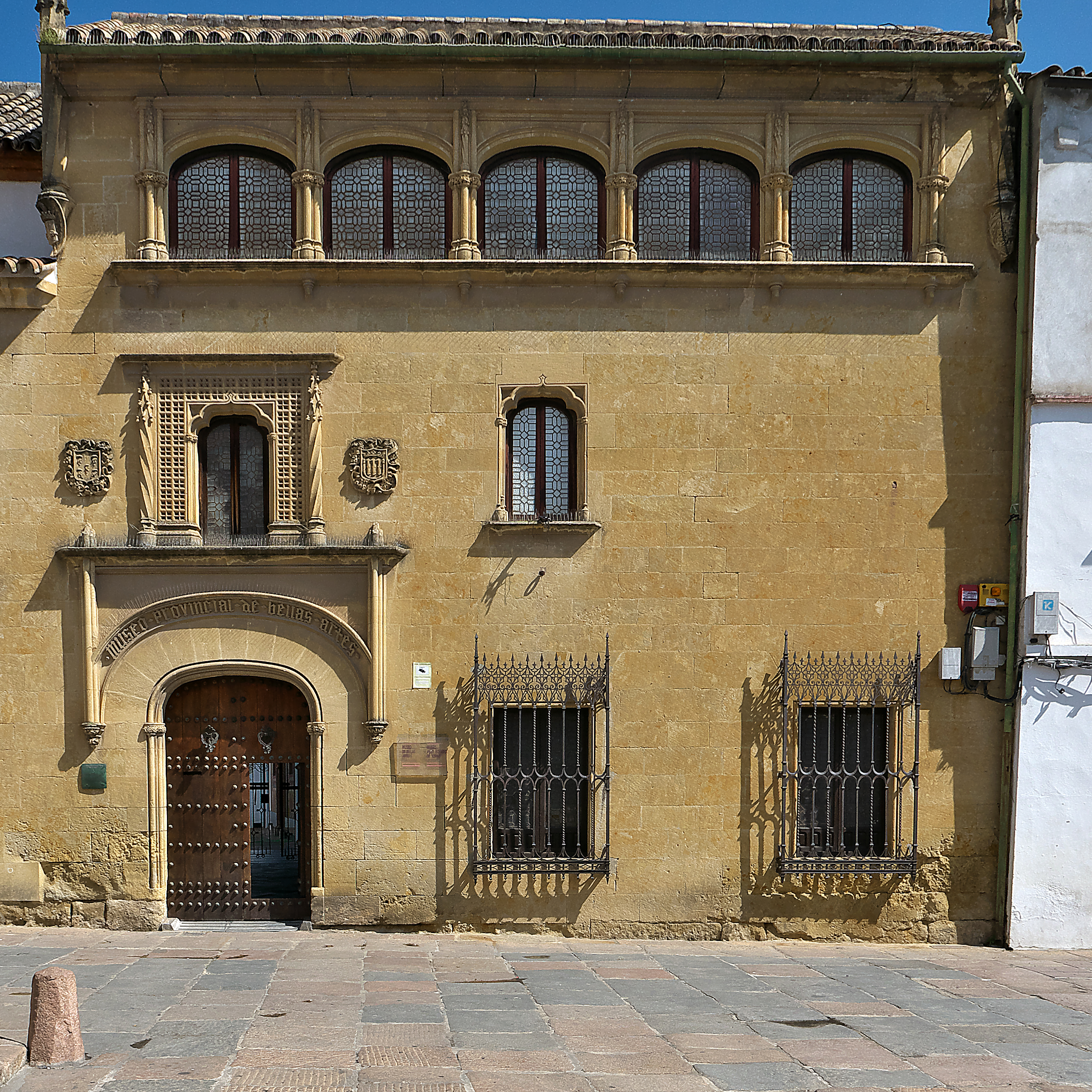 Francisco Javier de Luque y López remodela, acertadamente, la fachada del nuevo edificio adquirido para la ampliación del museo (h. 1925).